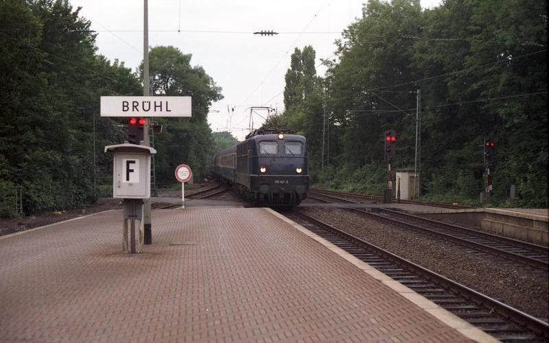 Juni 1988 Bonn, Bahnhof Brühl bei Bonn (Bundesbahn)